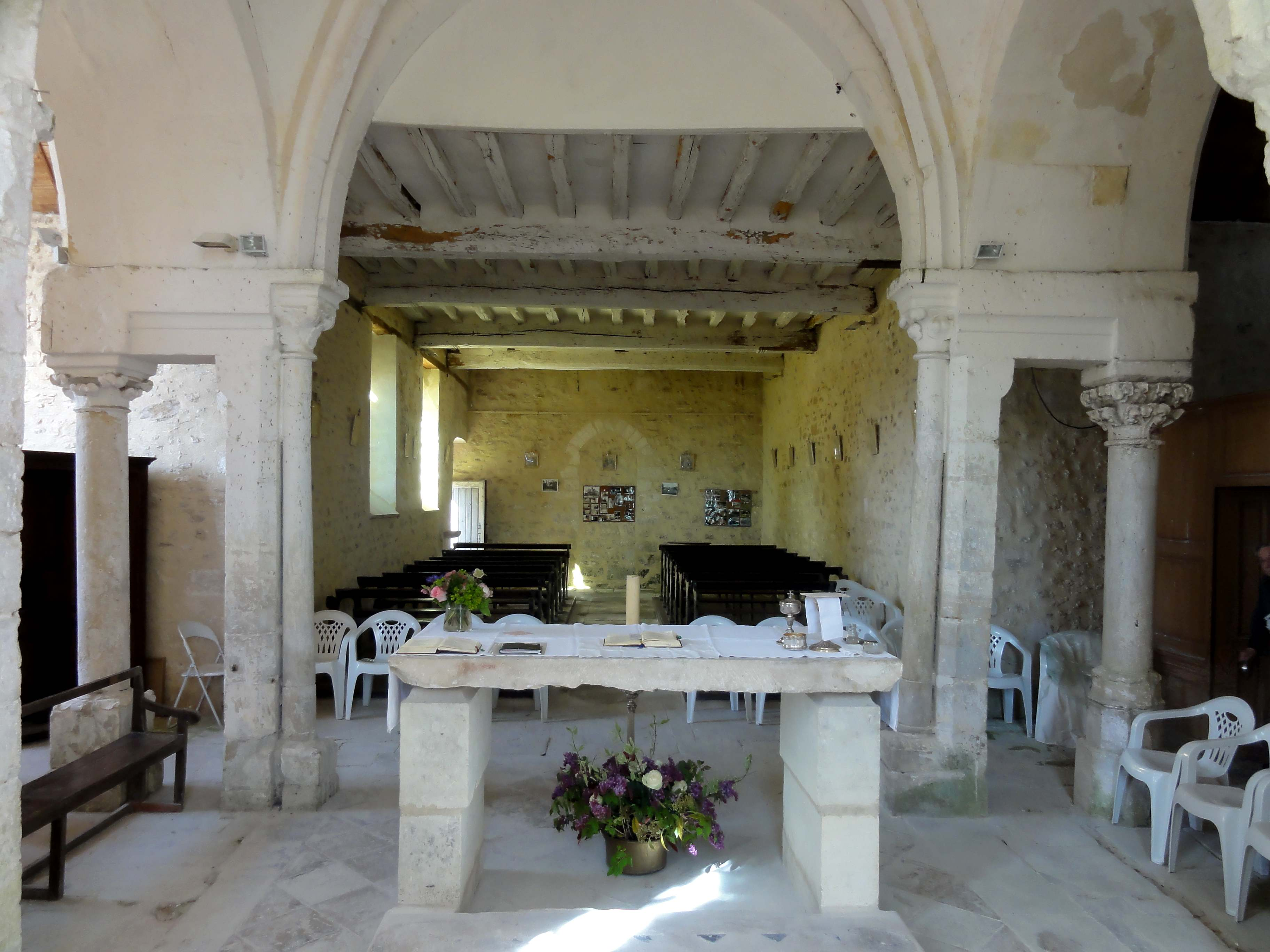 Intérieur de l'église - voir tire.